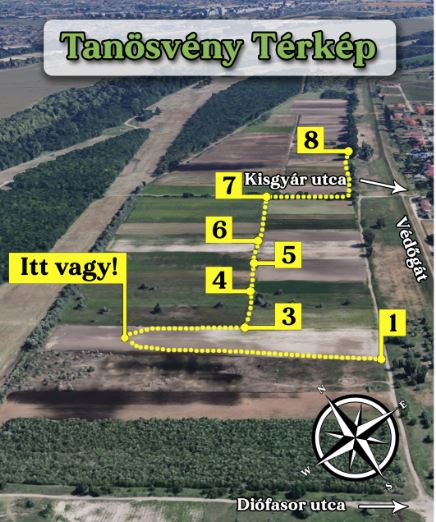 A Csepel-sziget Homokhátság tanösvény térképe